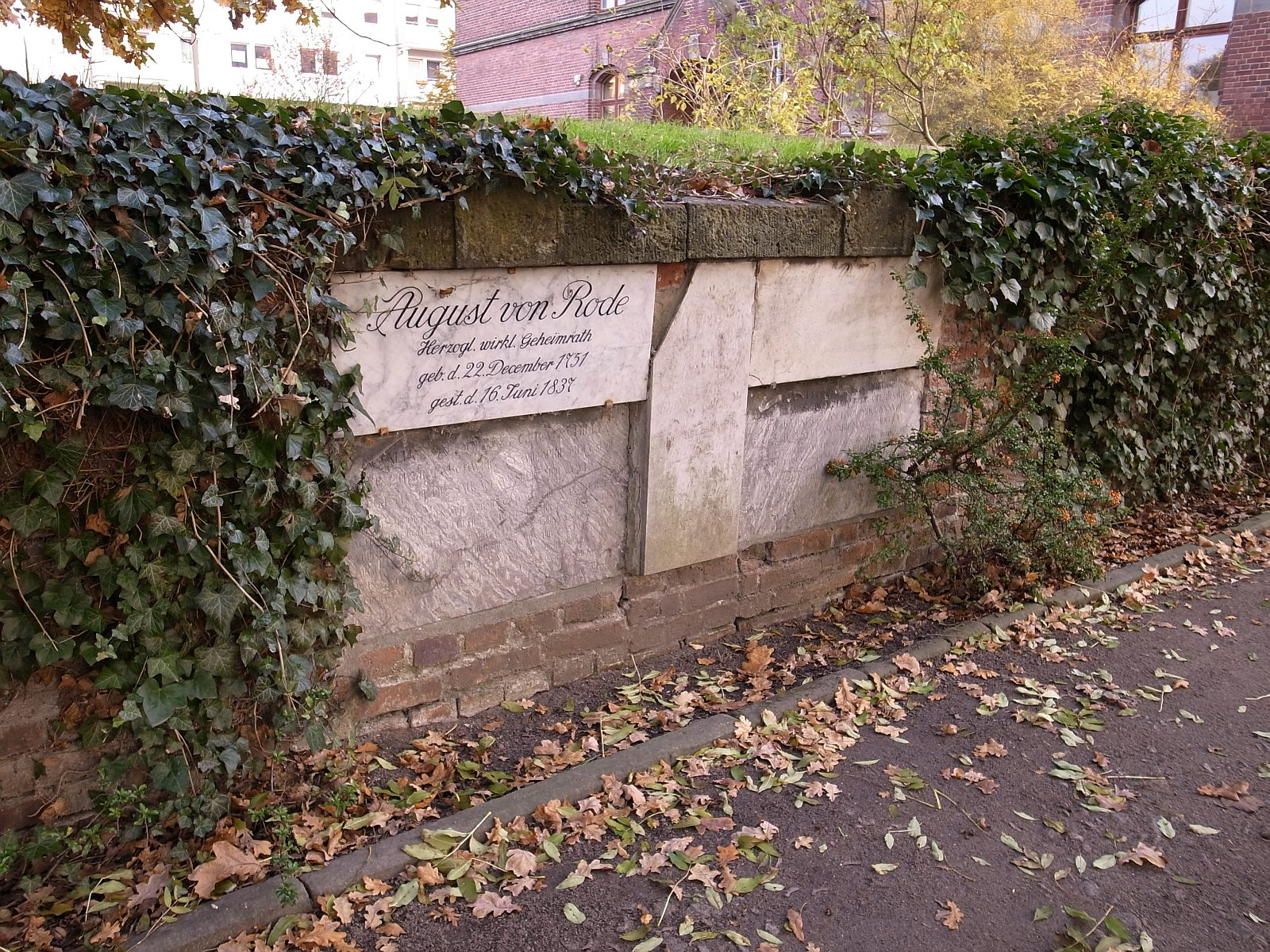 August von Rode, Neuer Begräbnisplatz (Dessau)